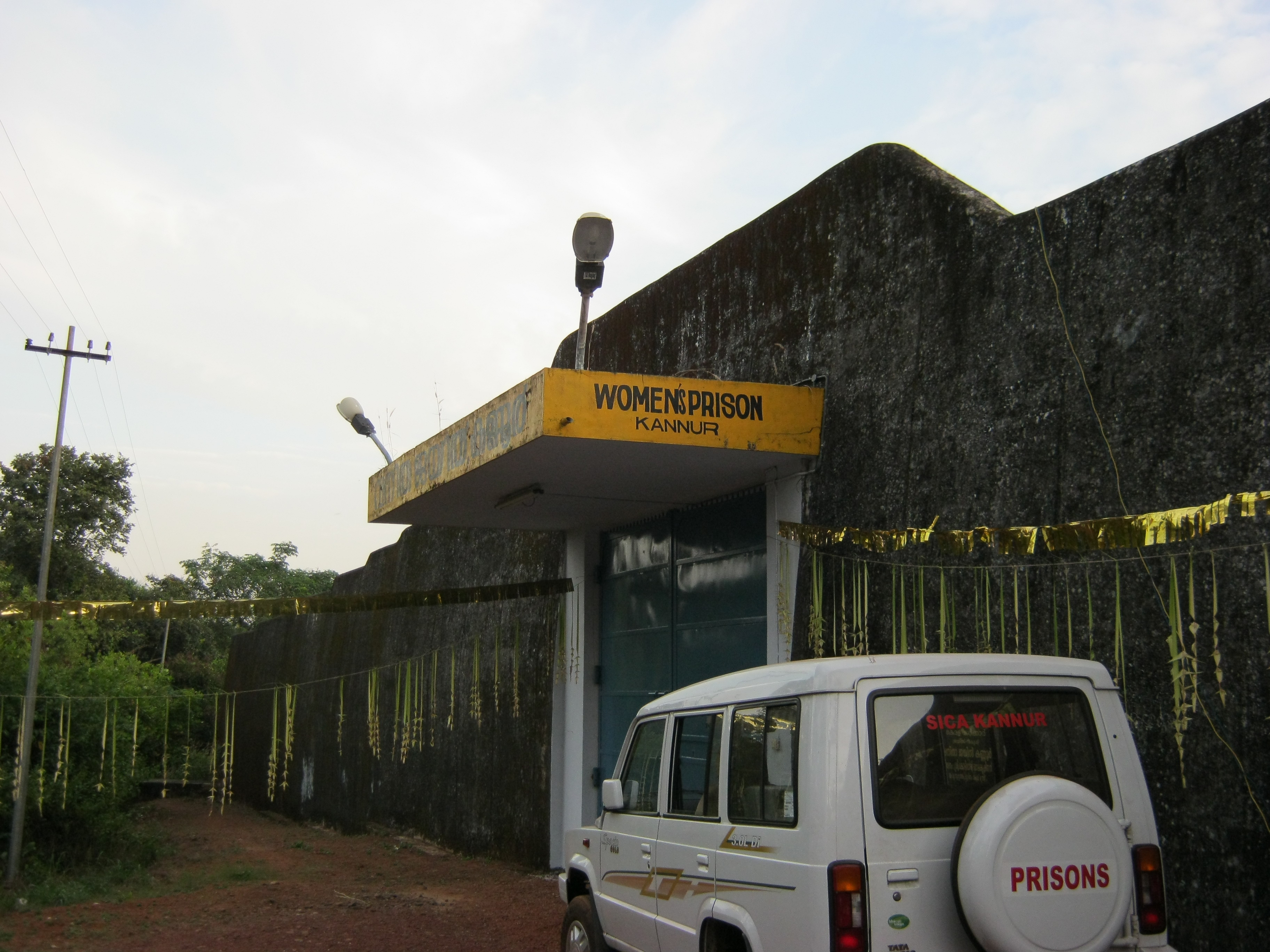 വനിതാജയില്‍ കണ്ണൂര്‍